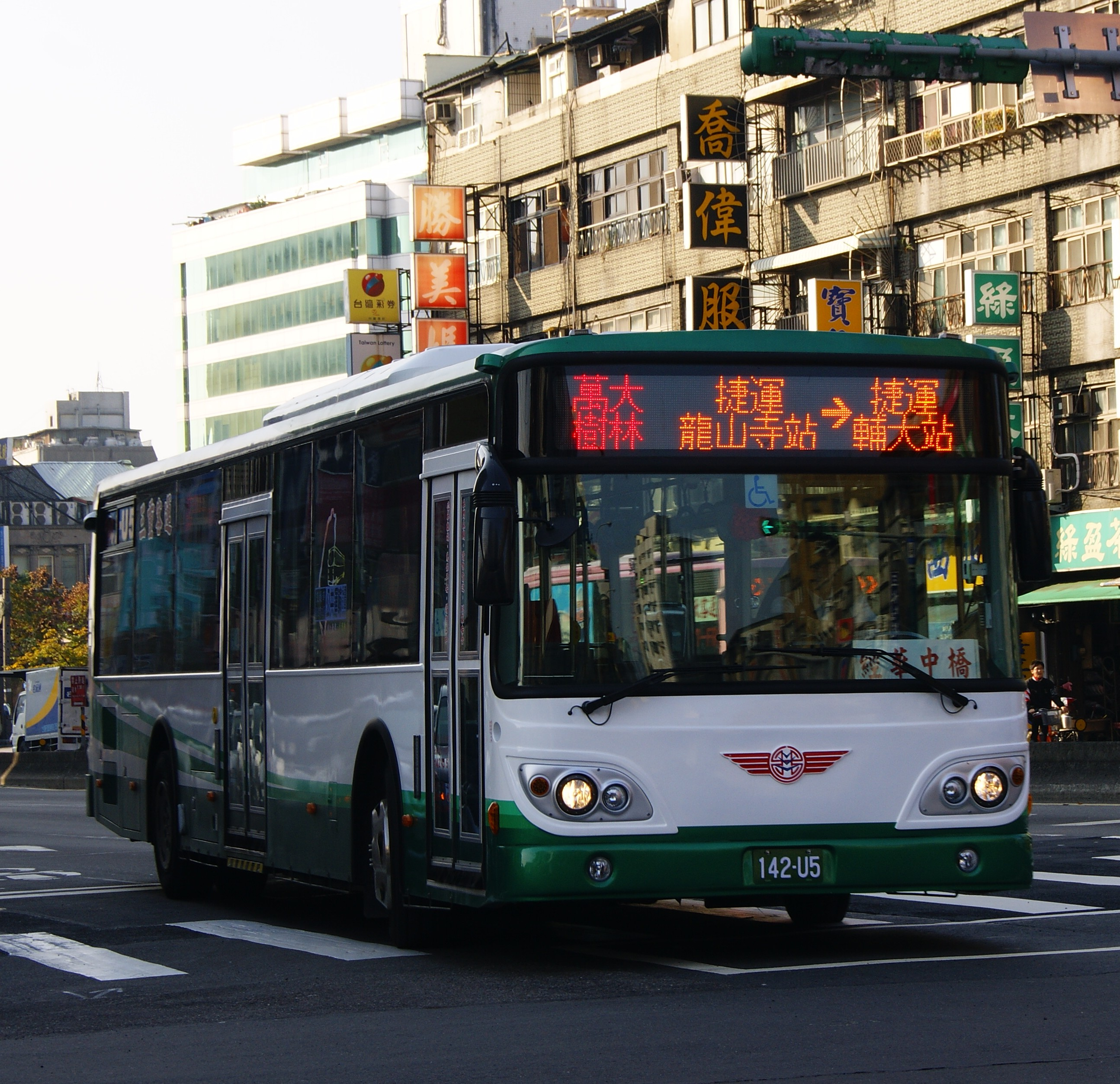 三重客運五期大宇BS120CN低地板行駛萬大樹林先導公車142-U5